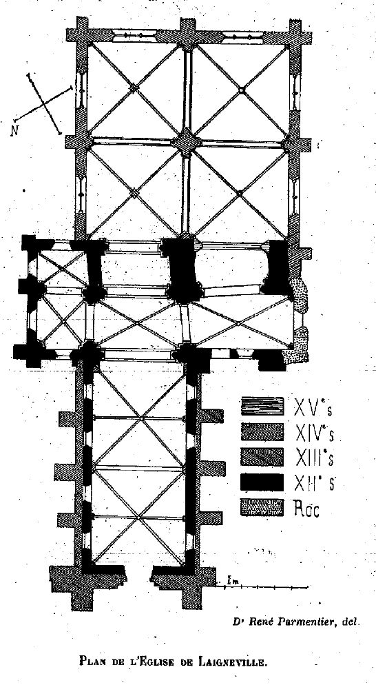 Plan des masses de l'église Saint-Remi.